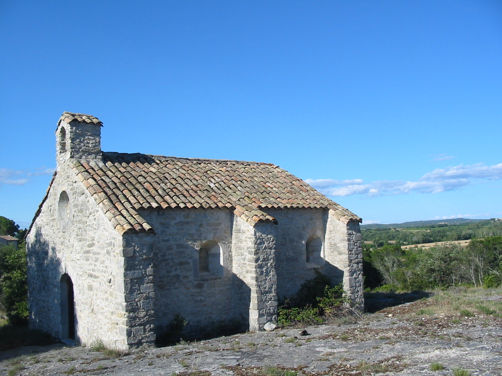 église de Puechredon (XVIIe siècle)